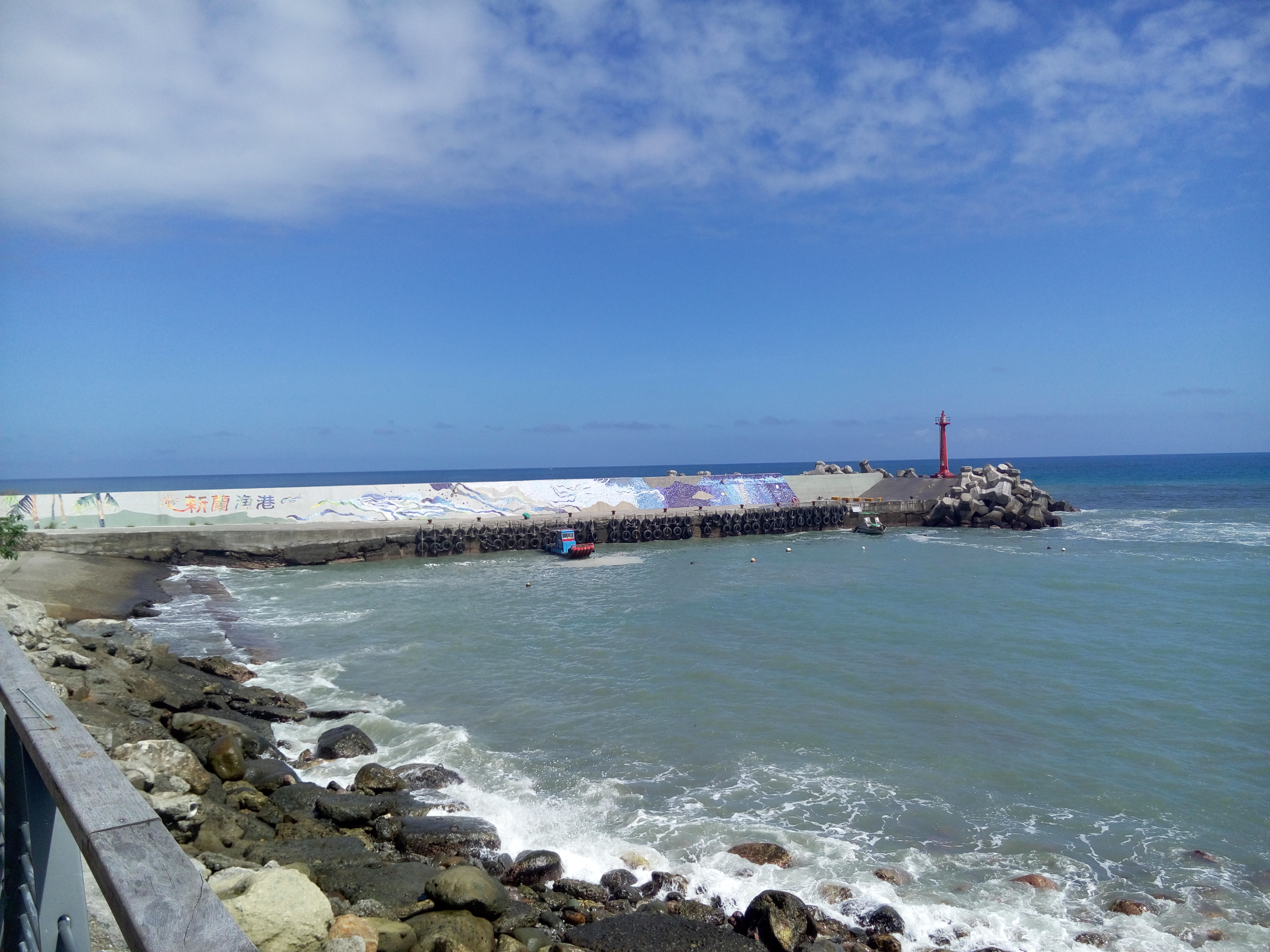 中文（台灣）: 中華民國(臺灣)臺東縣新蘭漁港中文（中国大陆）: 台湾台东县新兰渔港